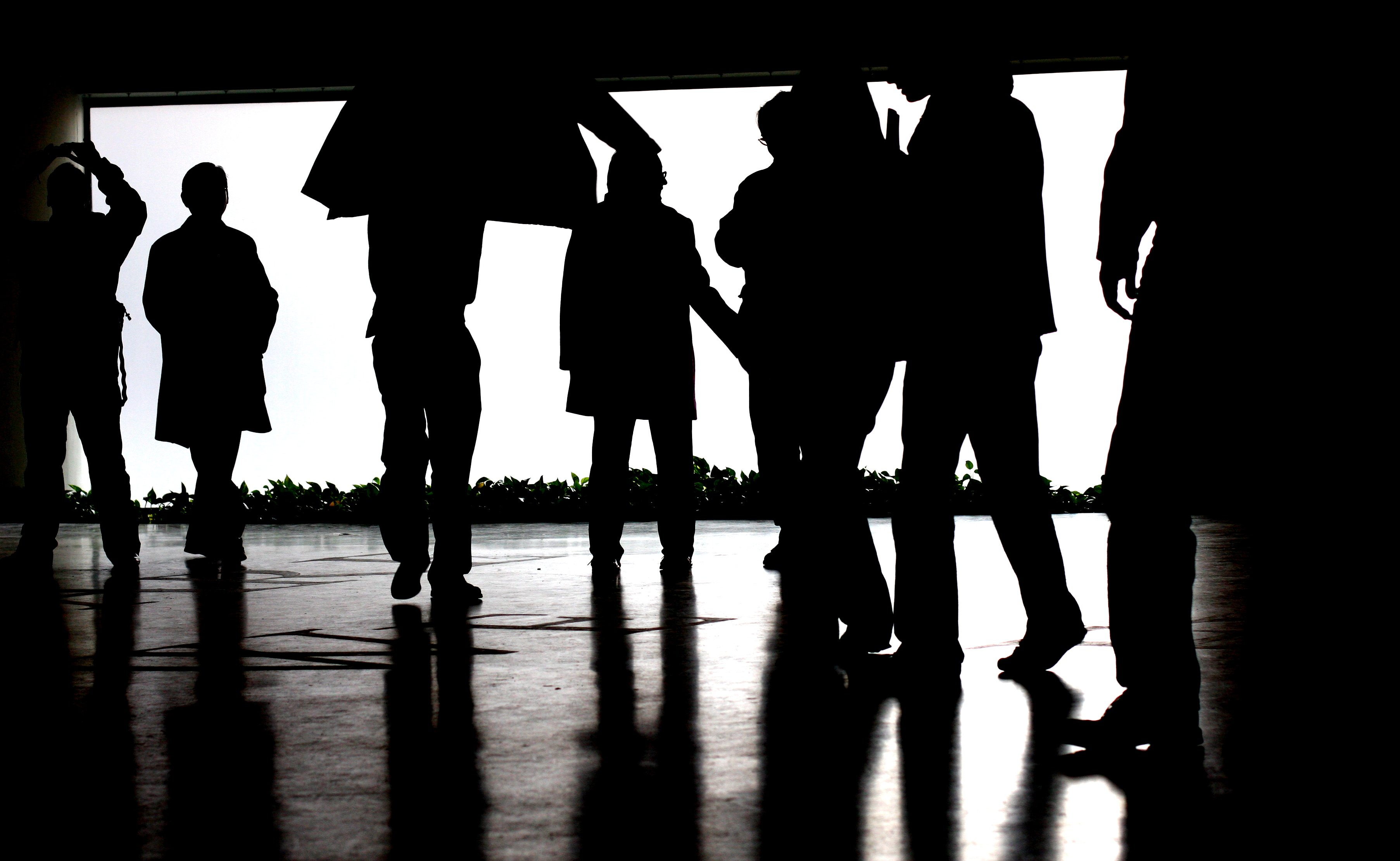 explored